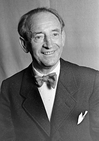 Original image description from the Deutsche Fotothek Porträts: Prof. [Max ?] Pechstein, [Johannes?] Stroux, Kraus, Benedik, Lederer, Theodor Plivier, Prof. Victor Klemperer und Klaus Gysi